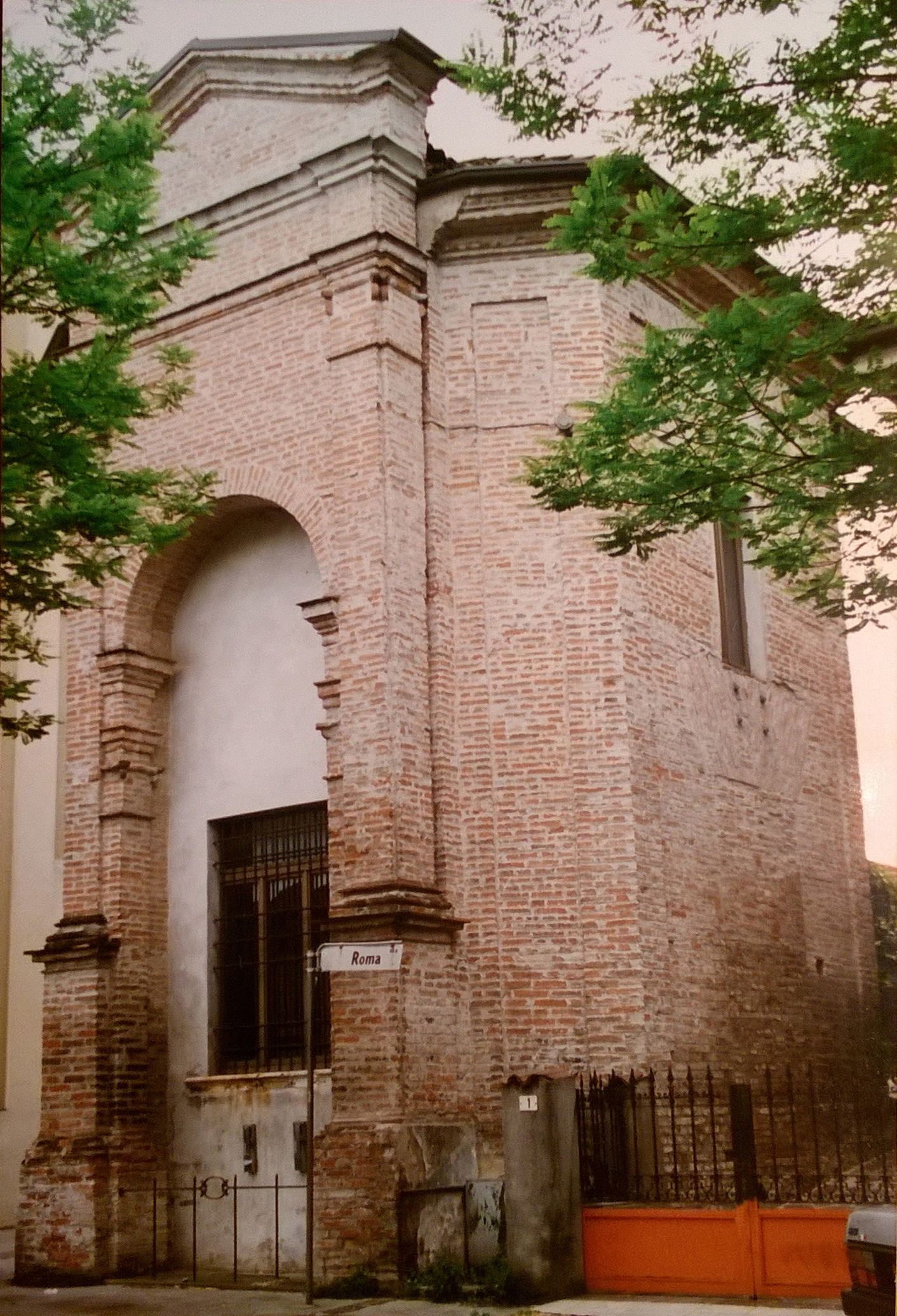 Ufficio Vecchio di Castel Mella